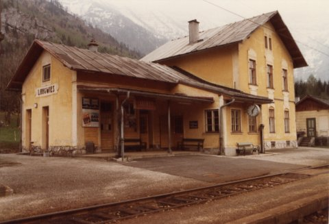 Aufnahmsgebäude Langwies aus der Bauzeit der Ebensee-Ischl-Steeger Bahn